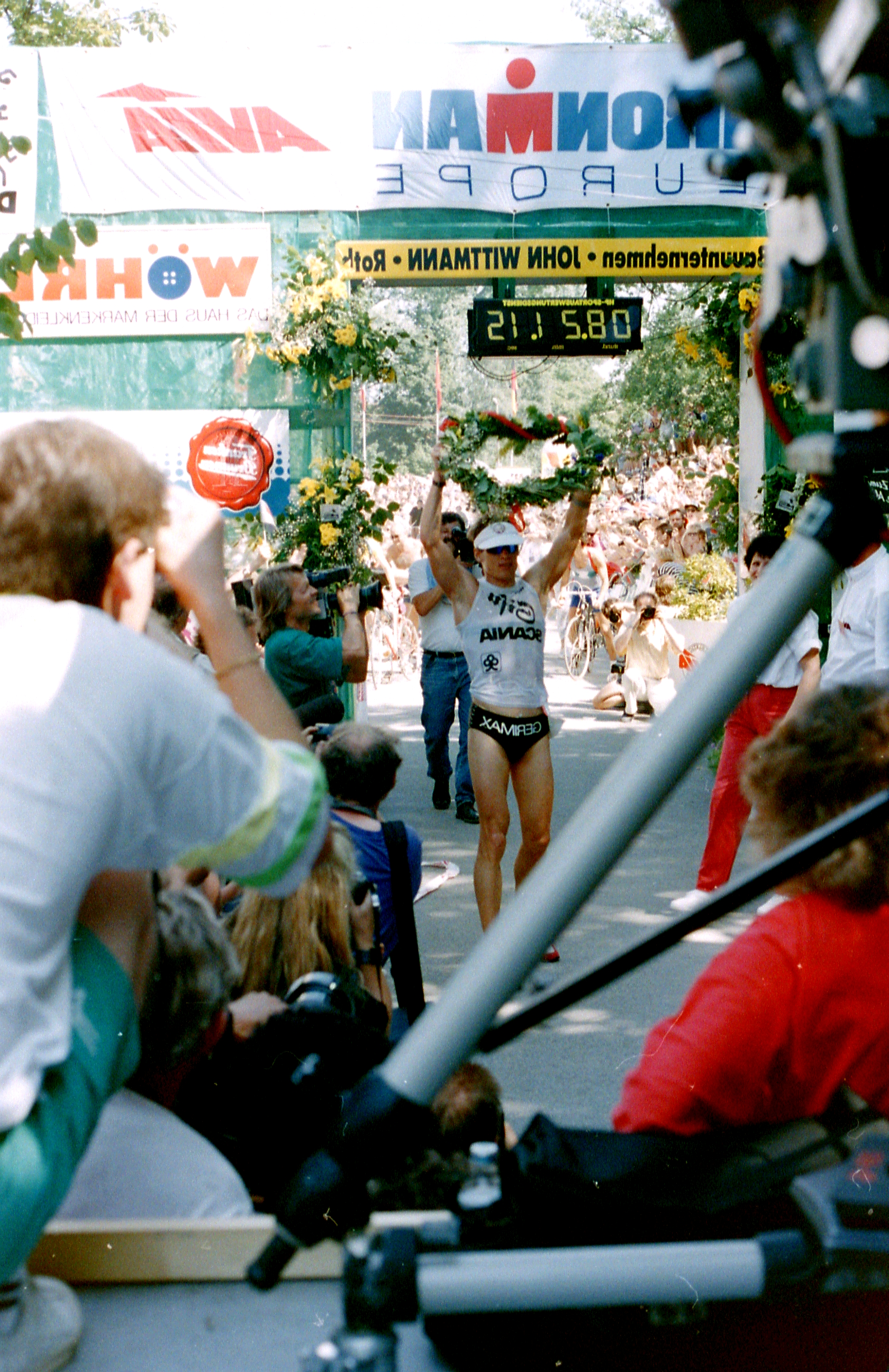 Deutschland (D) - Bayern (BY) - Landkreis Roth (RH) - Roth: Ironman Europe 1990, Zieleinlauf